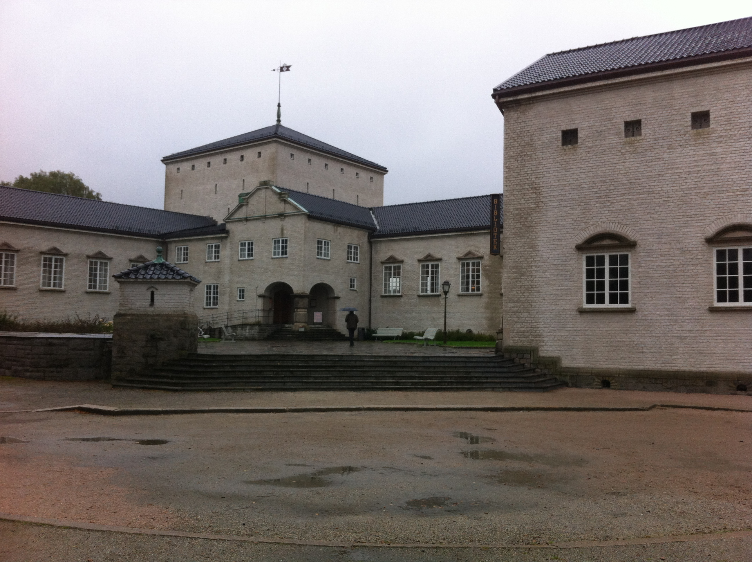 FREDRIKSTAD BIBLIOTEK